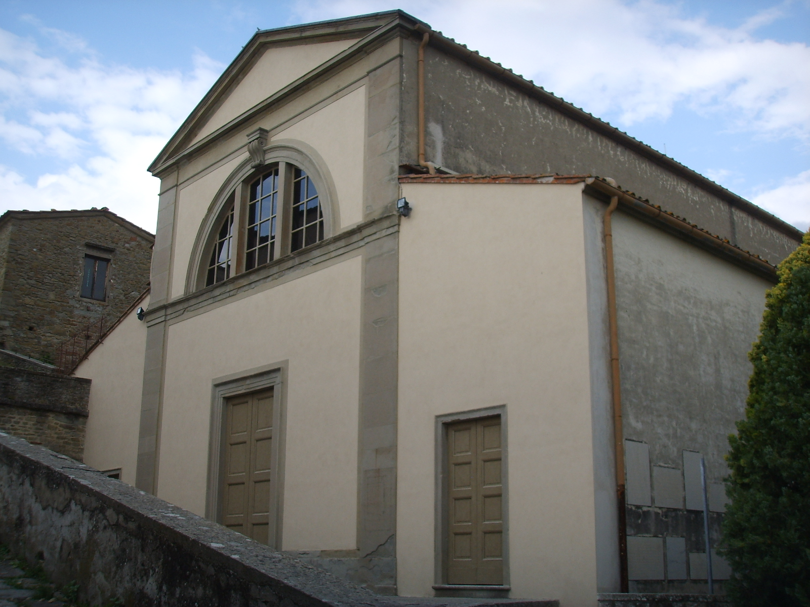 Basilica di sant'alessandro, fiesole